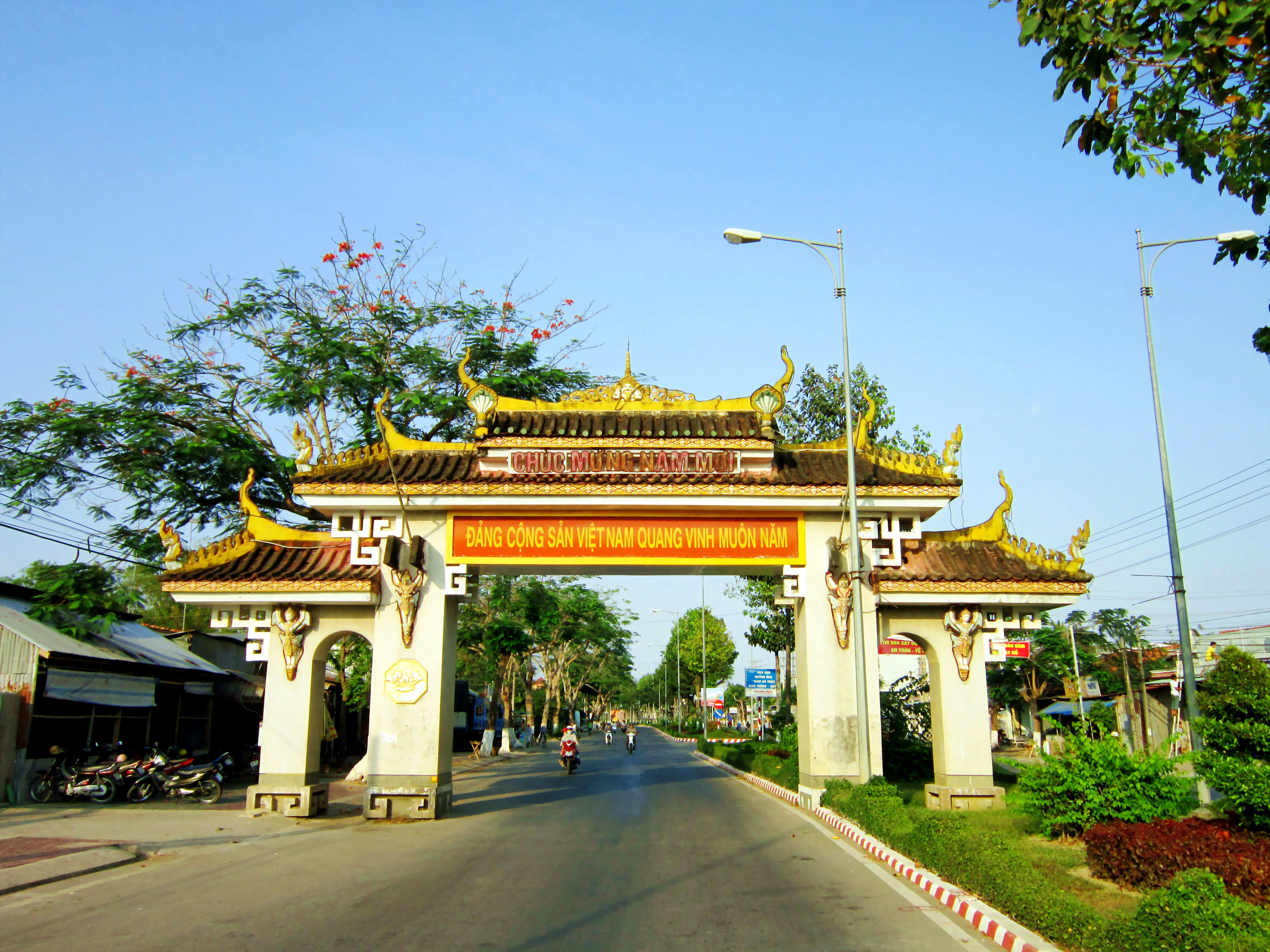 Cổng chào thành phố Trà Vinh, tỉnh Trà Vinh, Việt Nam.